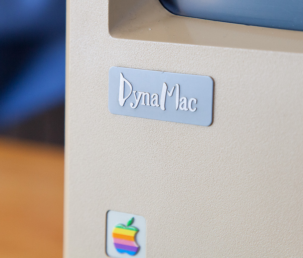 1985年、唯一内部に手を入れる事が許されたDynaMac（改Plus）